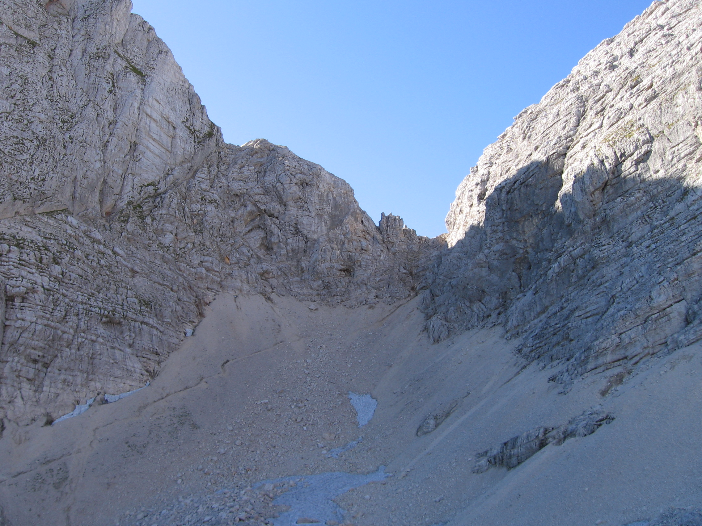 Scree under Stenarska vratca pass, Slovenia